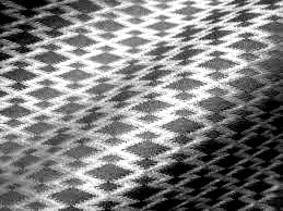 CG